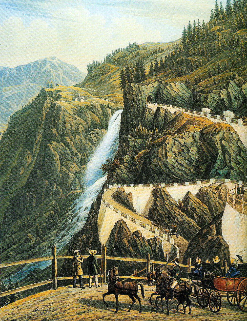 Die biedermeierlichen Reisegeschwindigkeiten in wilder Alpenwelt: Eilwagen Chiavenna-Chur unterhalb von Pianazza an der 1823 vollendeten Splügenstrasse